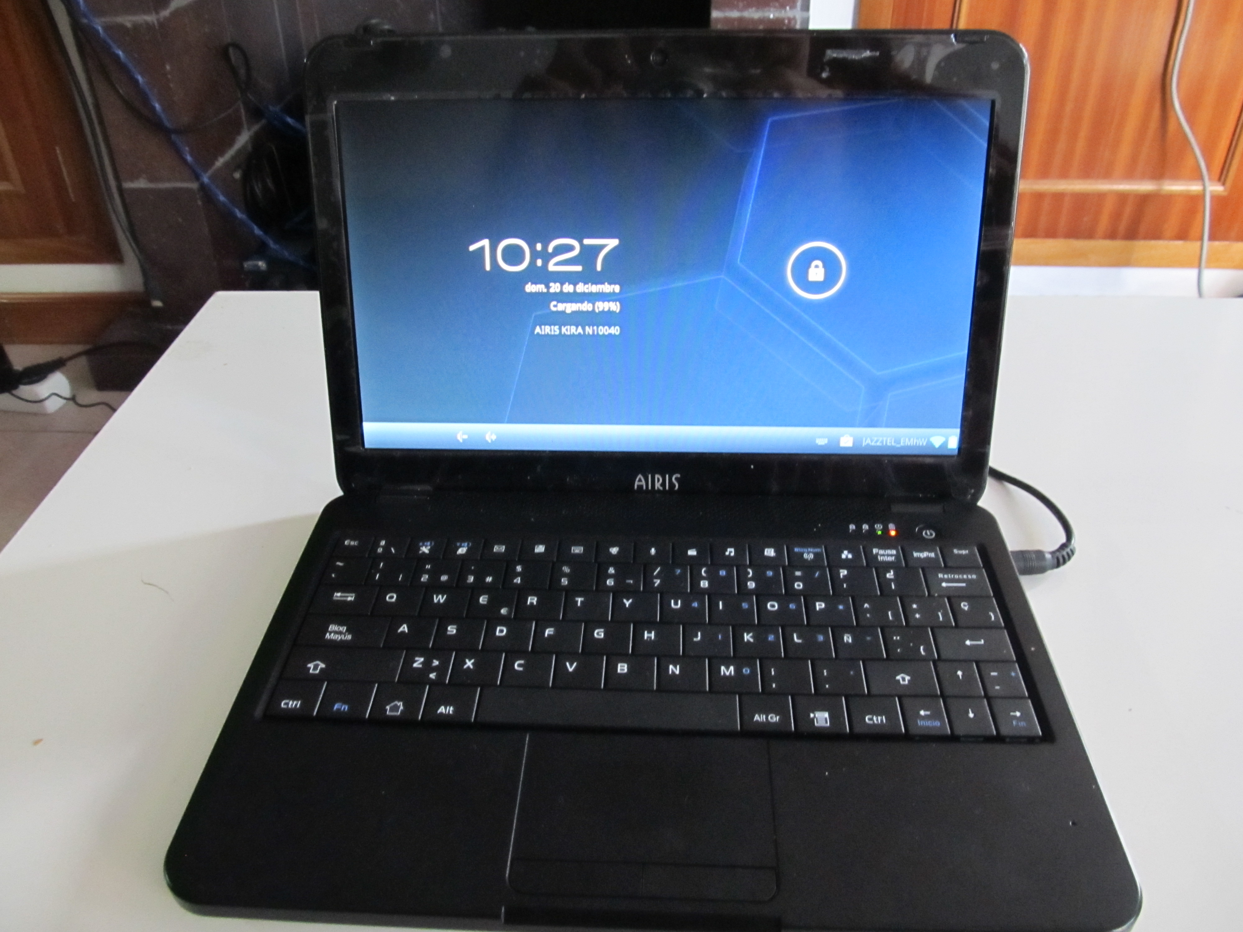 Airis Kira N10040 abierto y bloqueado (Android 4.0)